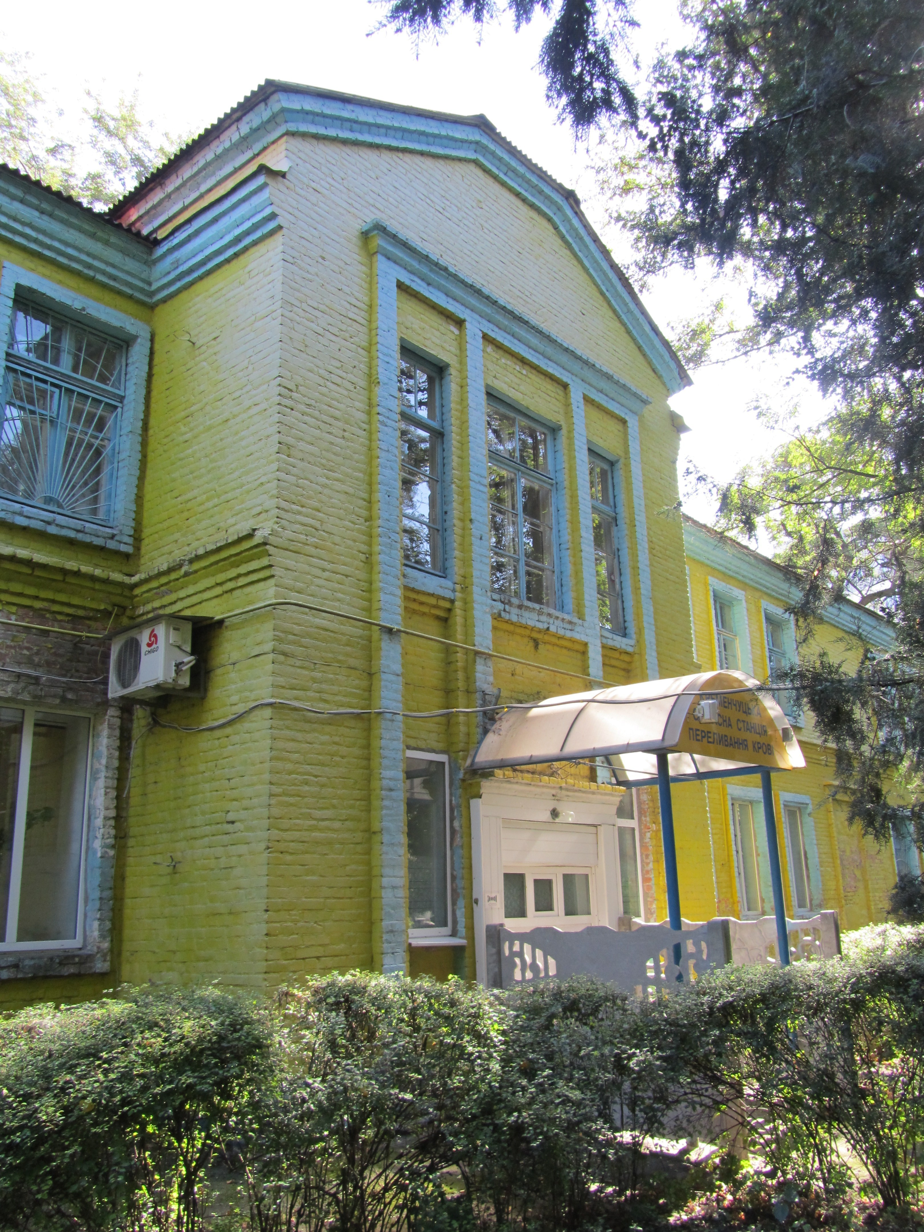 Кременчуцька станція переливання крові - Головна будівля